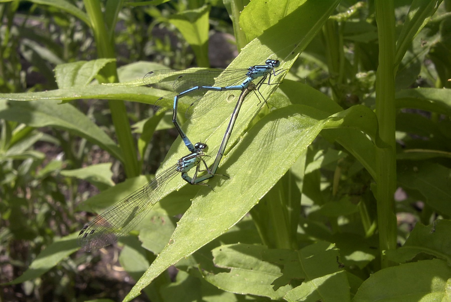 Hufeisen-Azurjungfer, Paarung